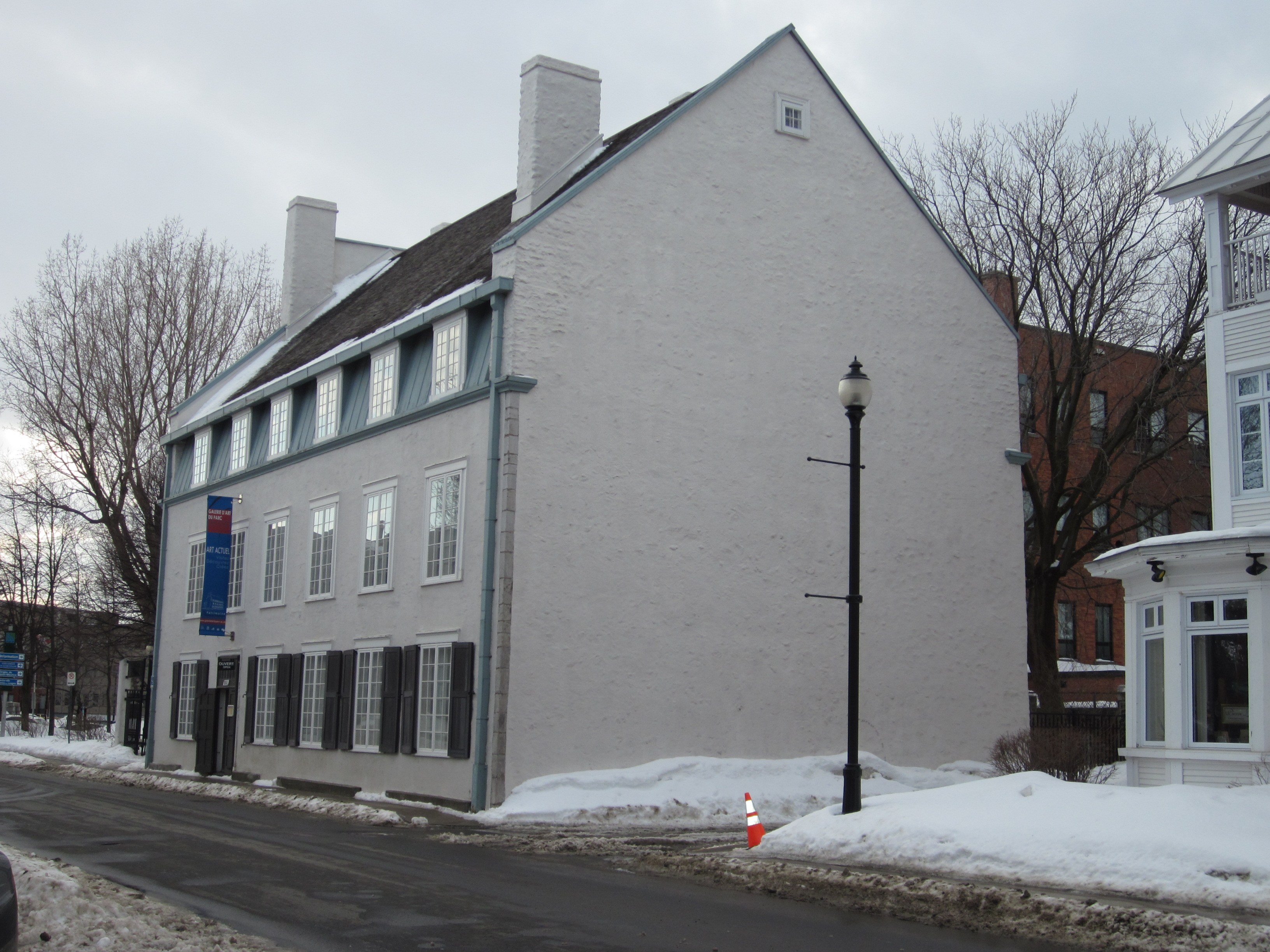 Le manoir de Tonnancour est une maison bourgeoise construite en 1797 et il est situé sur au 864, rue des Ursulines dans l'arrondissement historique de Trois-Rivières. Il a été classé monument historique en 1964.